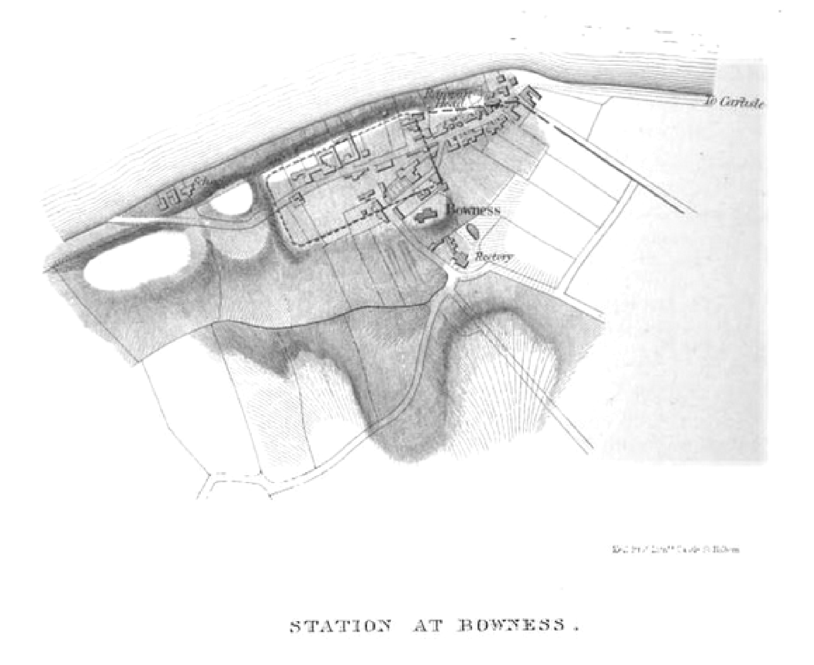 Planskizze des Wallkastells Maia (Bowness on Solway) aus dem 19. Jahrhundert.